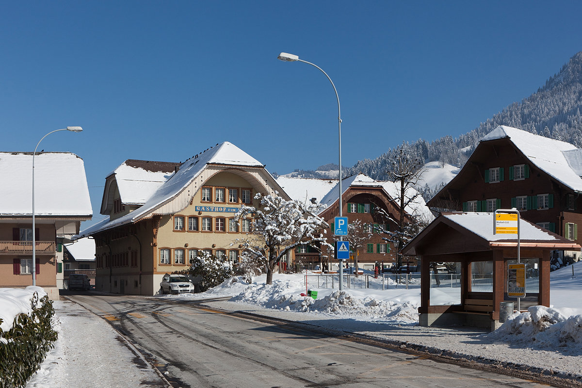 Mitten im Dorf Marbach